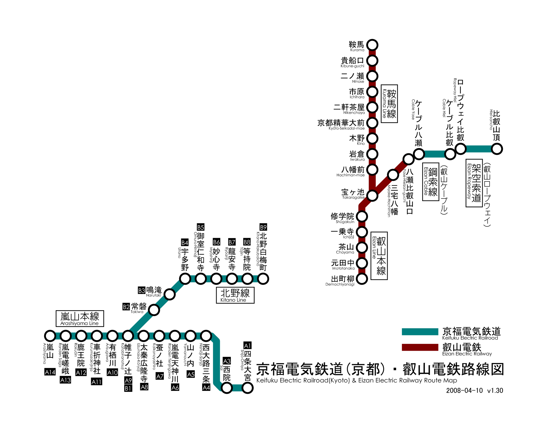 京福電気鉄道・叡山電鉄路線図 Category:鉄道路線図ja:Category:京福電気鉄道の画像ja:Category:叡山電鉄の画像